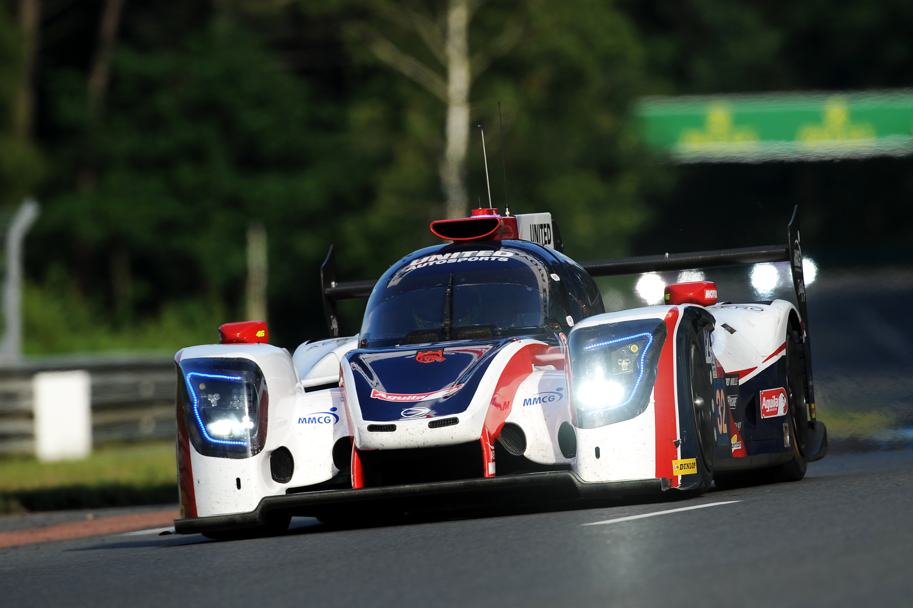 United Autosport lors des 24 Heures du Mans 2018.